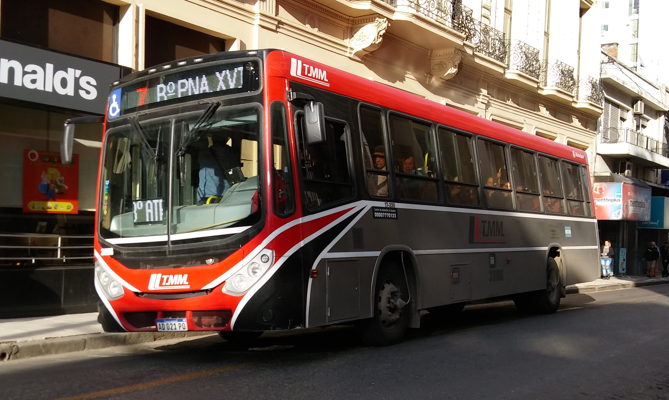 Transporte Mariano Moreno (Grupo ERSA) Línea 7 - Interno 3806 Ramal Único: B° A. Medina - B° Paraná XVI - B° San Roque - B° A.A.T.R.A. III Metalpar Tronador 3ra Generación Volkswagen 17.230-OD